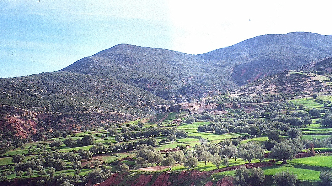 Anti-Atlas: Ölbaumkulturen und Feldfruchtbau auf etwa 800 Metern Höhe im April